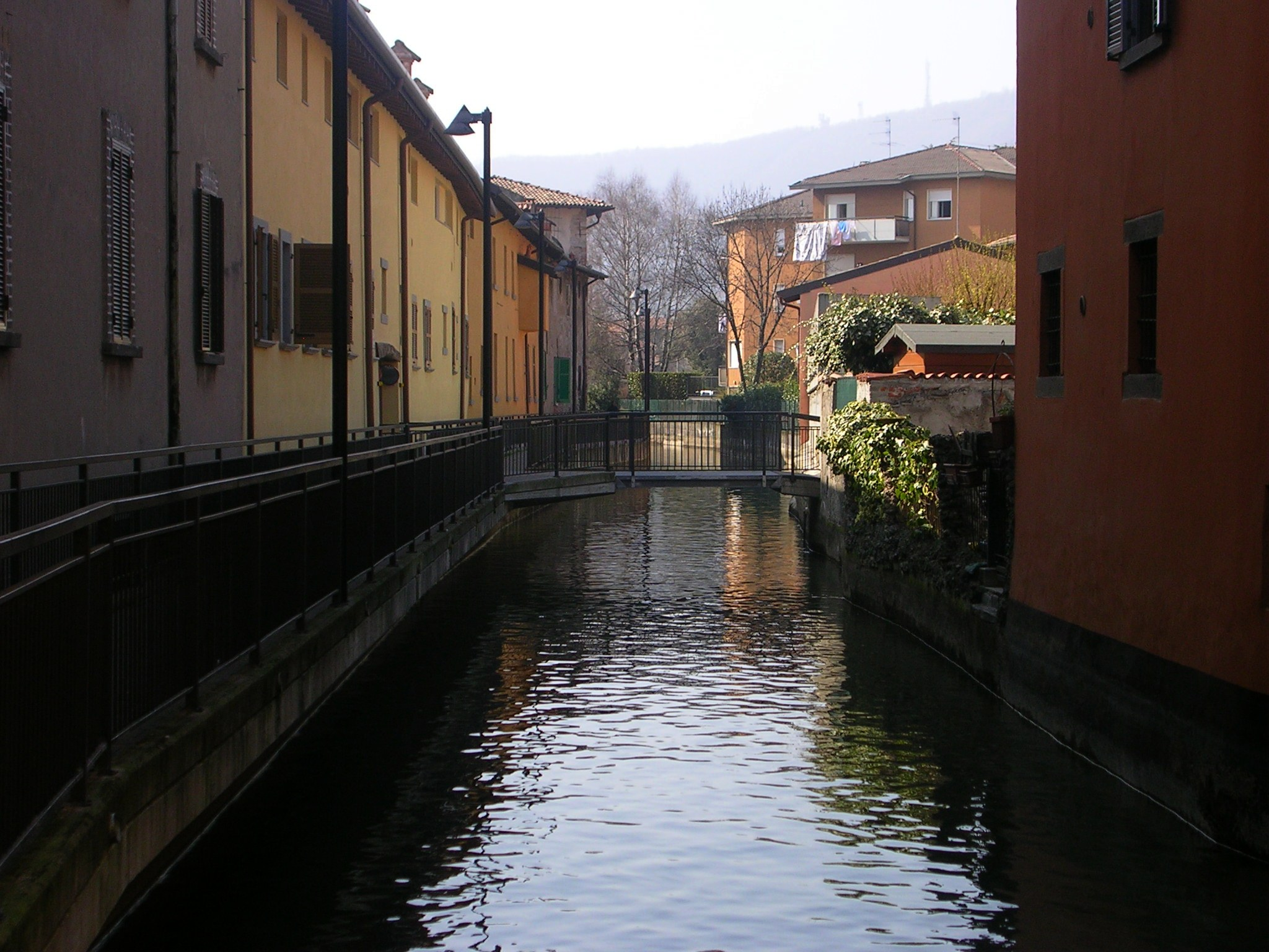 La roggia Serio Grande presso Alzano (Bergamo), nei pressi della chiesa di San Pietro